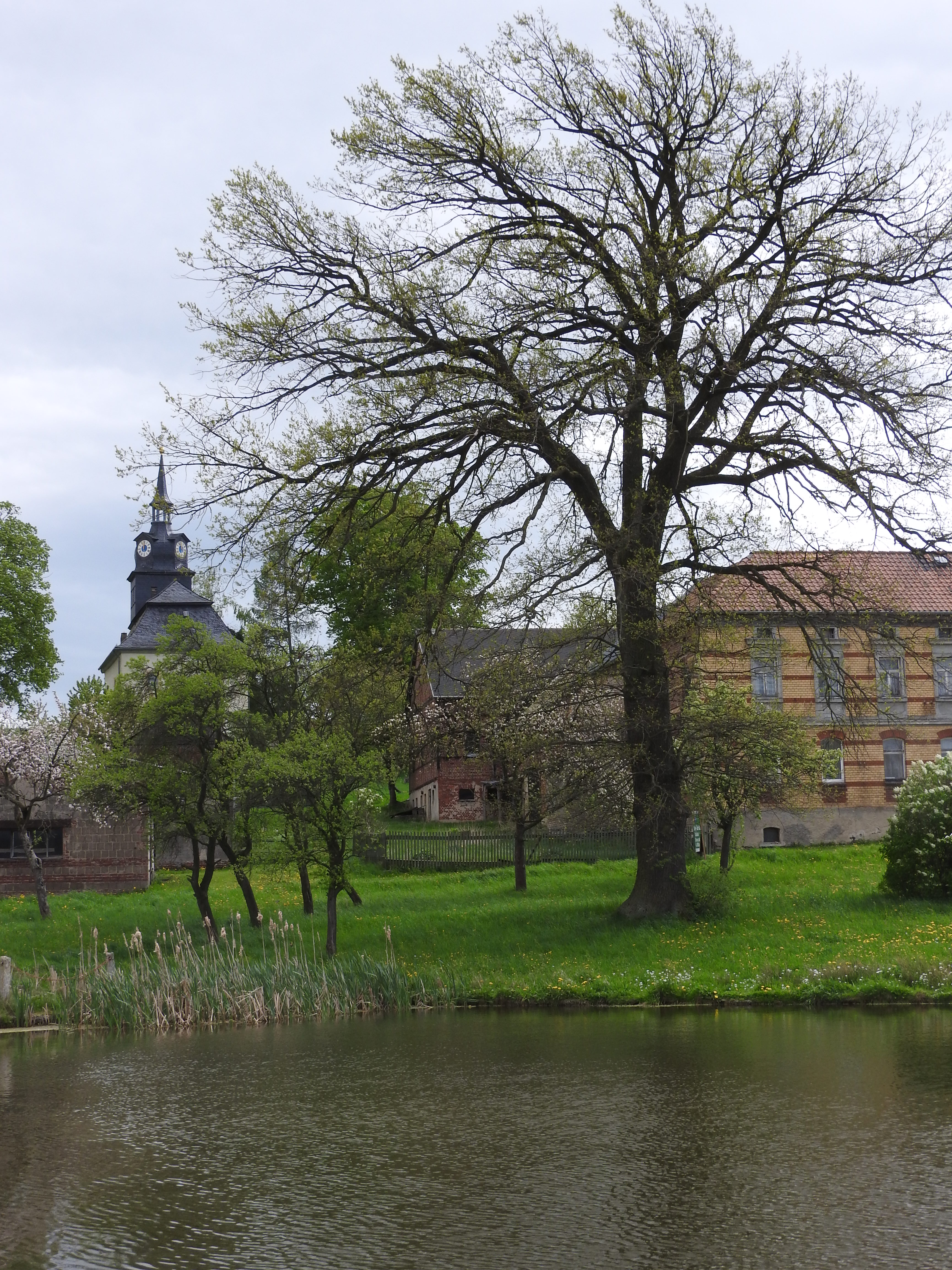 Chursdorf, Dittersdorf, Thüringen